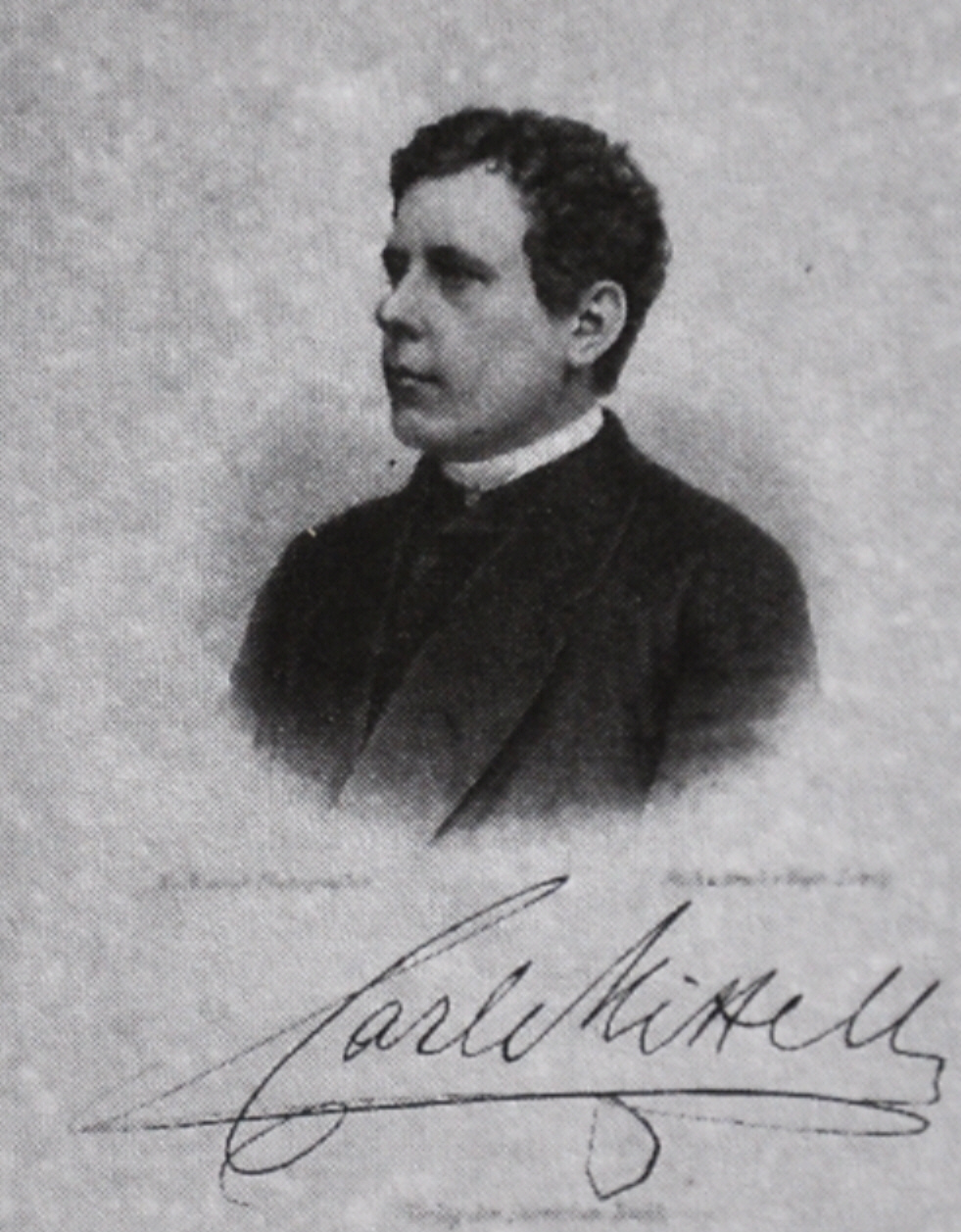 Karl Mittell, Stahlstich nach Photographie; gestochen von August Weger, Druck: Weger, Leipzig; Verlag: Dürr'sche Buchhandlung, Leipzig; Theaterwissenschaftliche Sammlung der Universität zu Köln, Sammlung Niessen, Inv. 37295